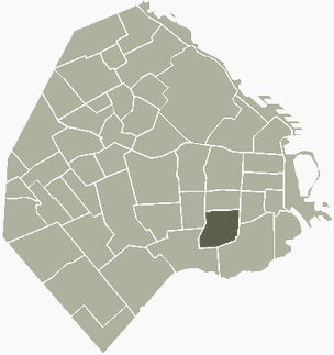 Barrio de Parque Patricios